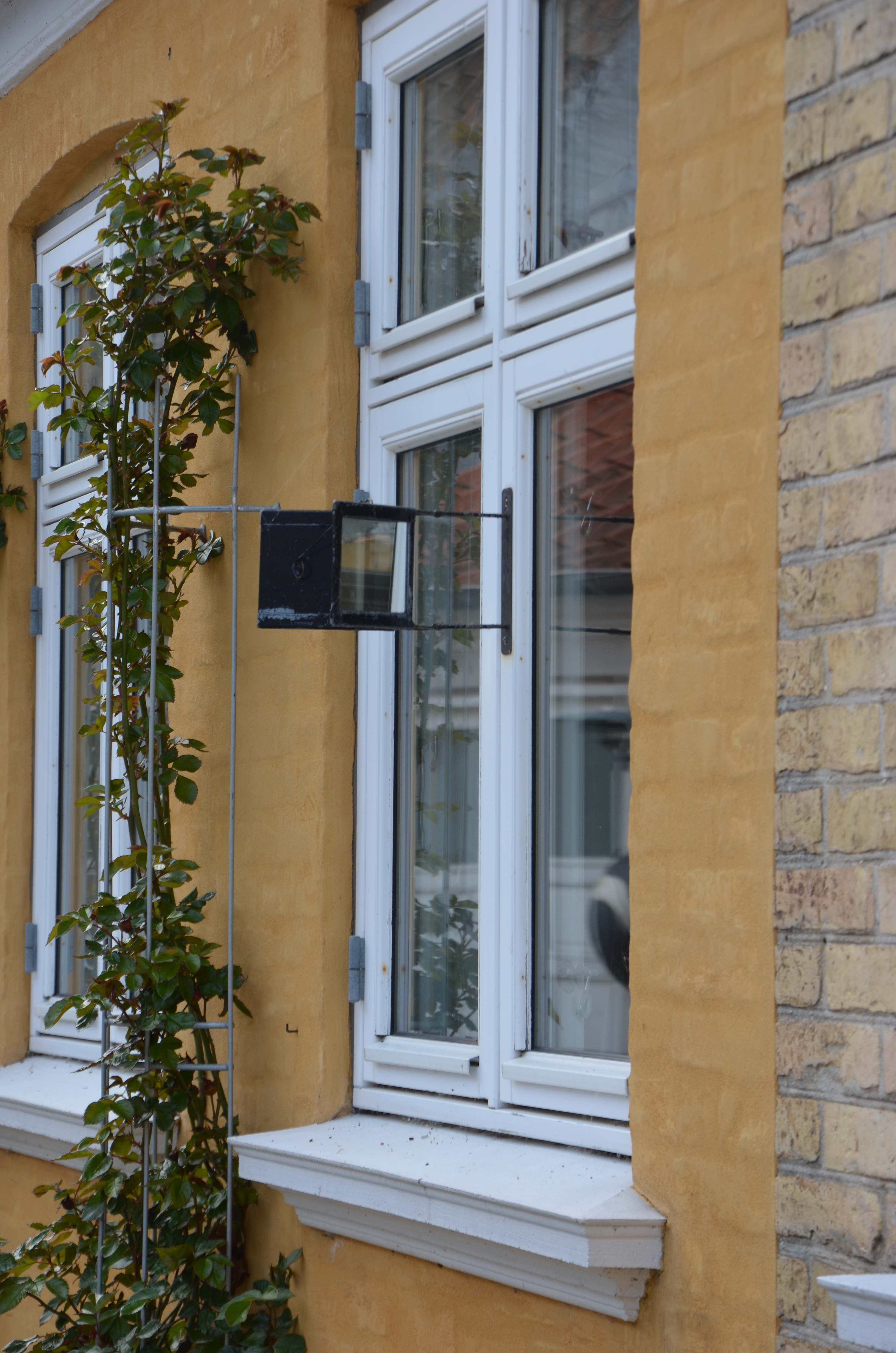 Svallerspegel i Marstal i Danmark